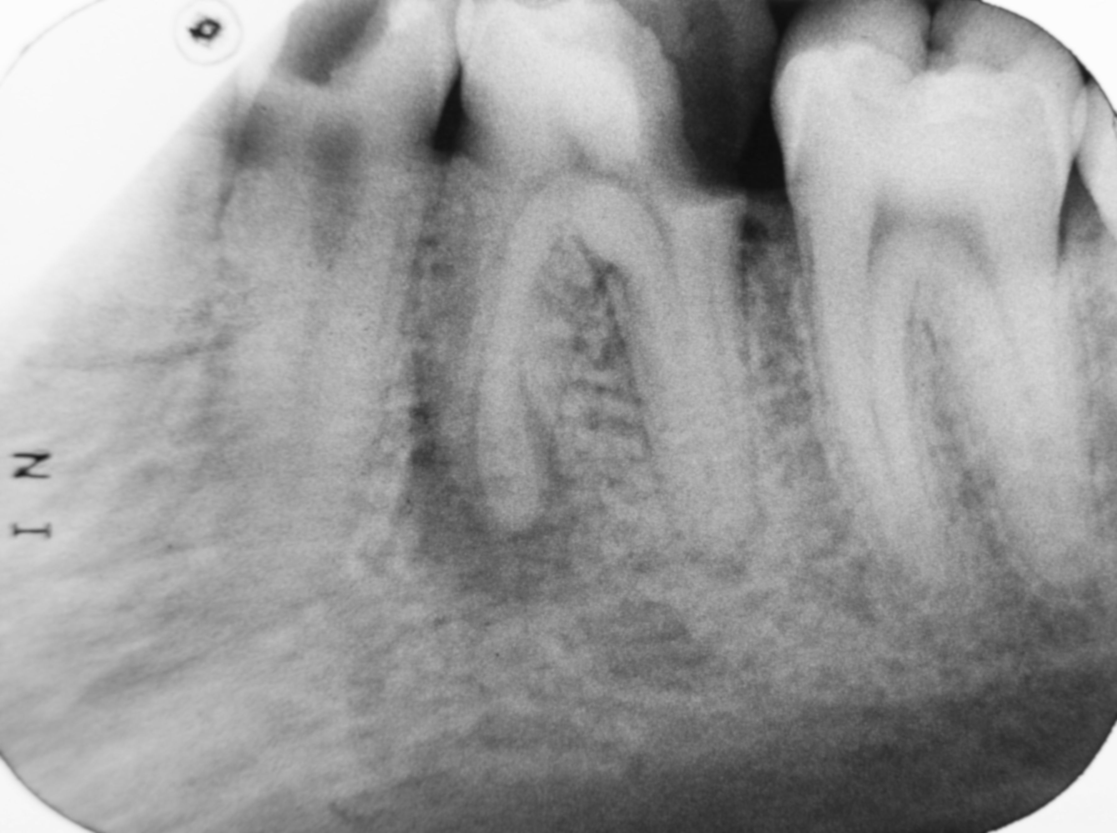 Dental X-ray